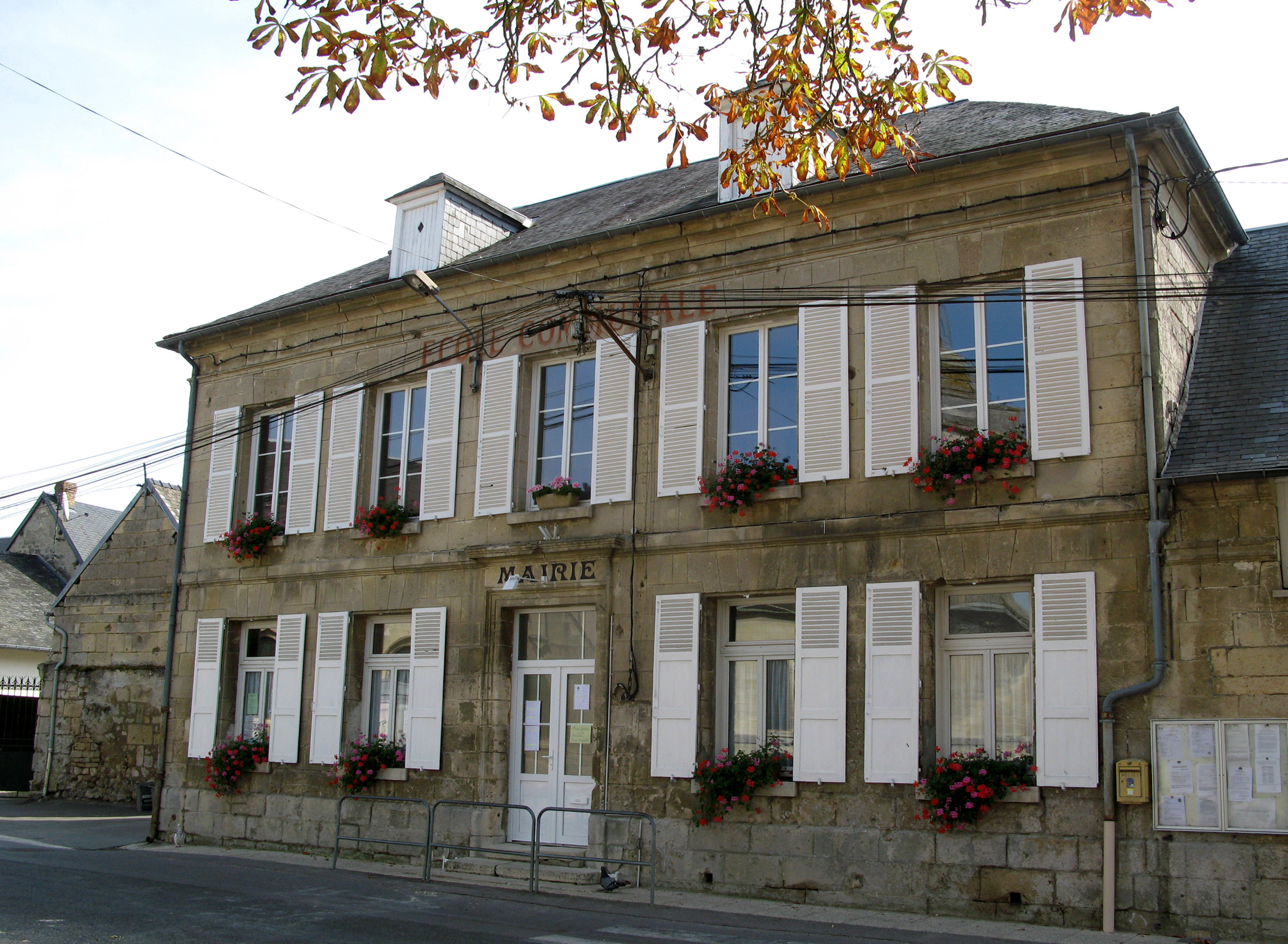 Saint-Christophe-à-Berry (Aisne, France) - La mairie. . .